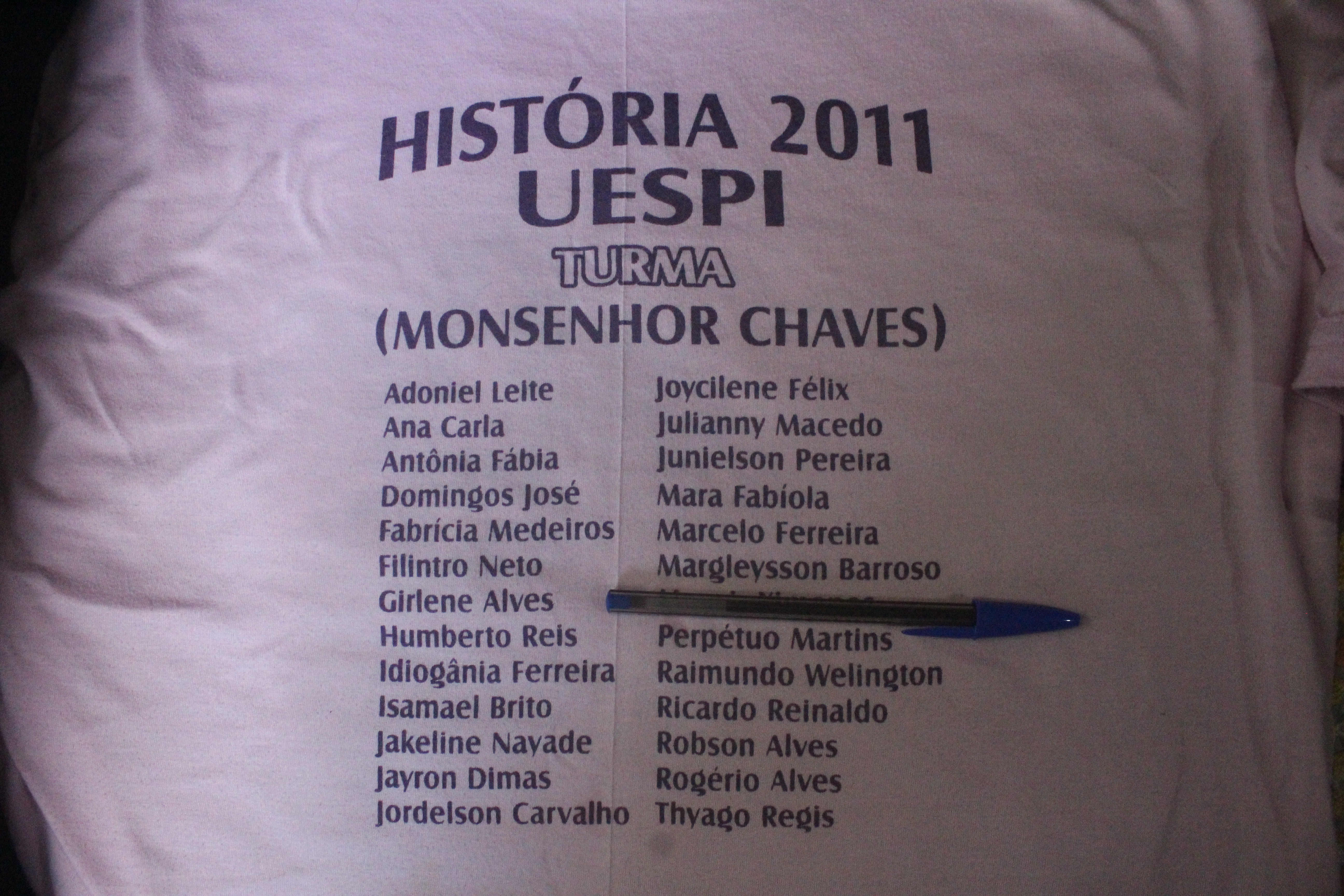 Concludentes de curso da Universidade Estadual do Piauí em homenagem ao historiador Joaquim Raimundo Ferreira Chaves.